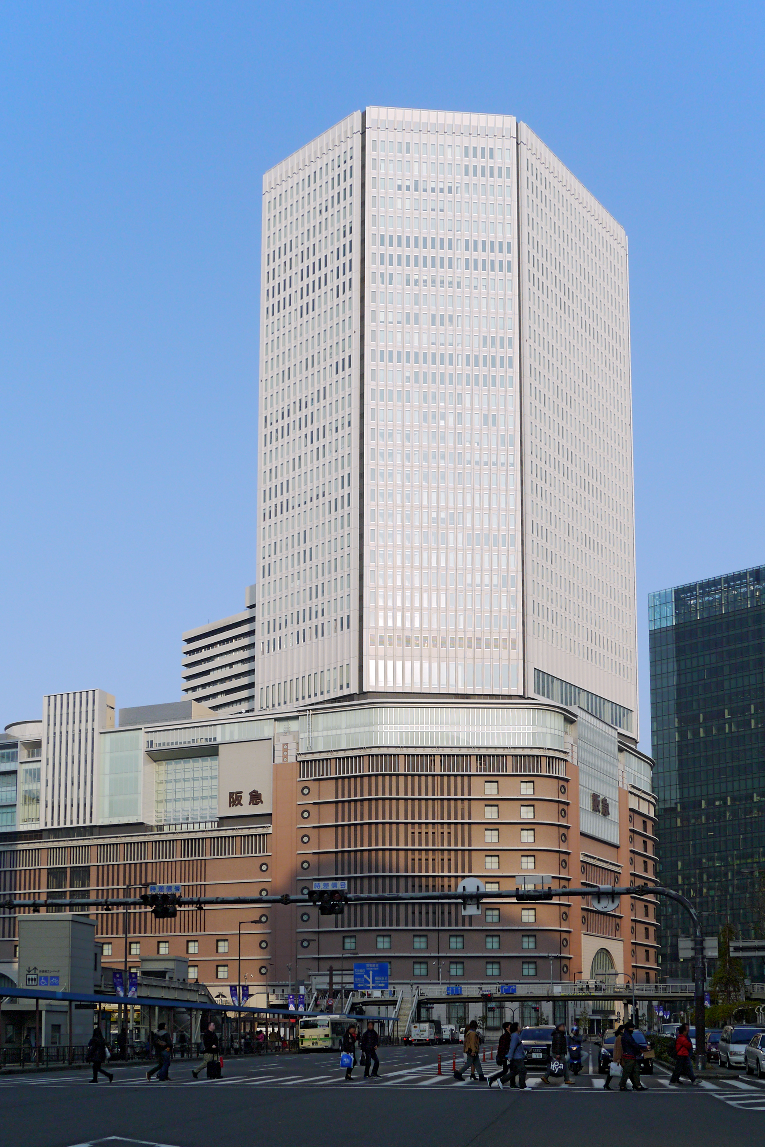 Hankyu Department Stores Umeda main store (阪急百貨店梅田本店), Osaka, Osaka prefecture, Japan